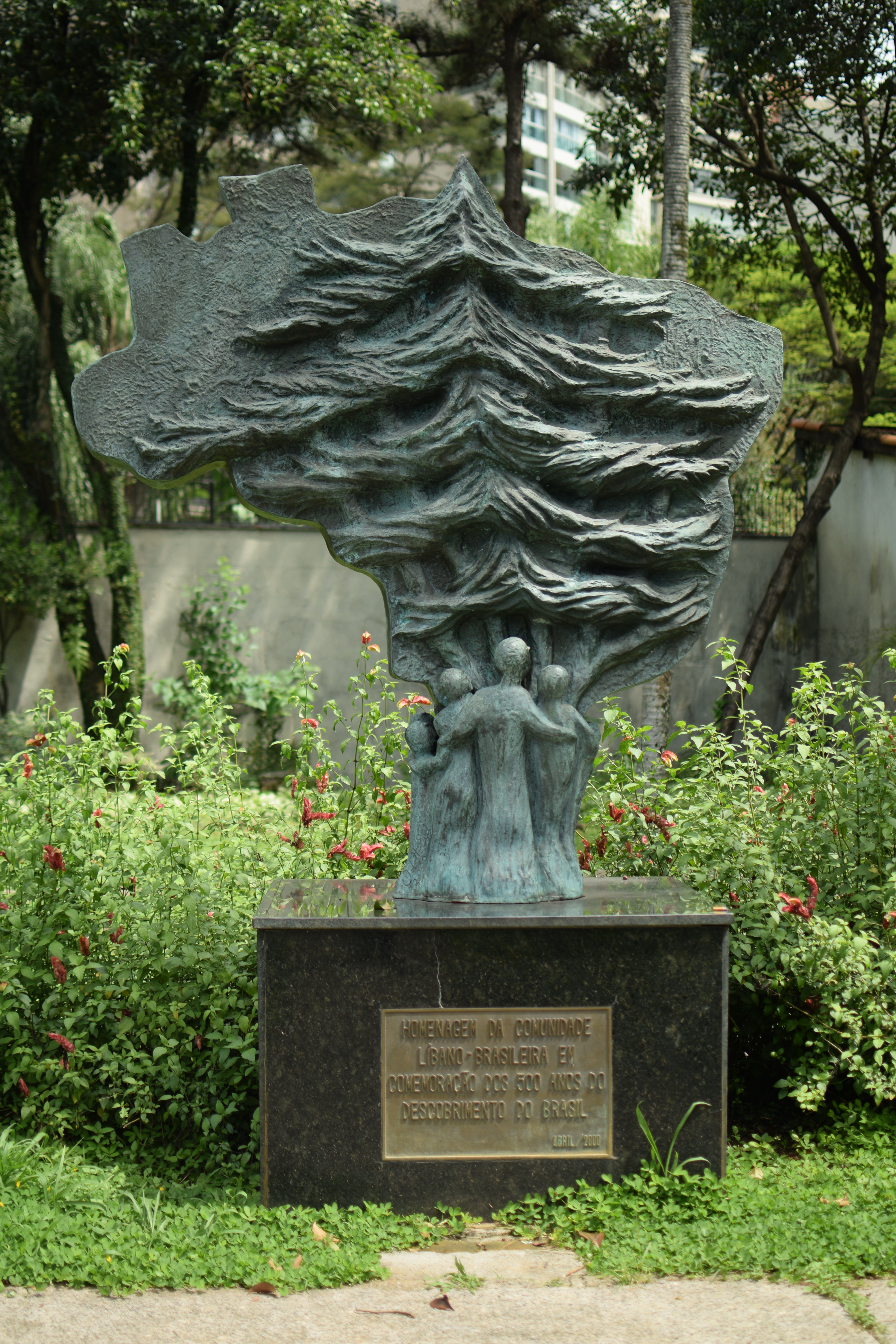 BRASIL FRENTE EM PÉ